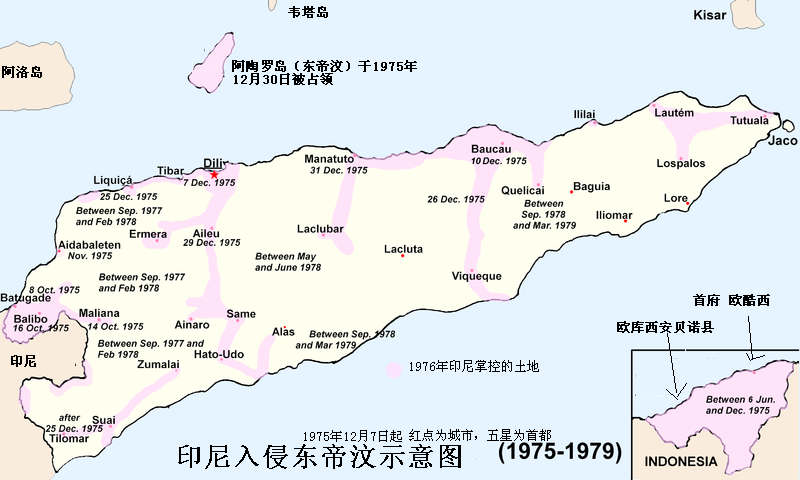 汉化自英文